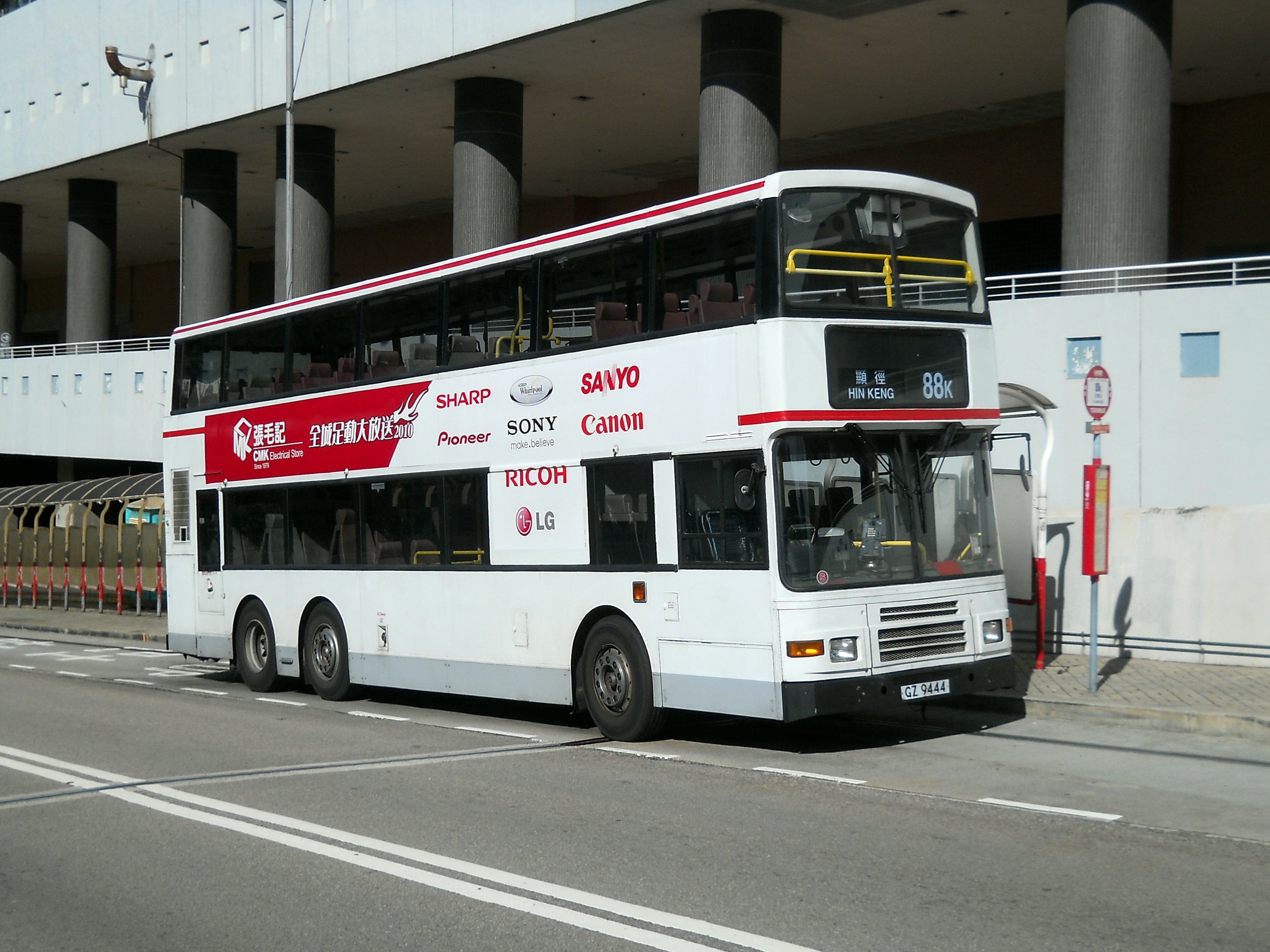 中文（香港）: 九龍巴士的88K線富豪奧林匹克巴士